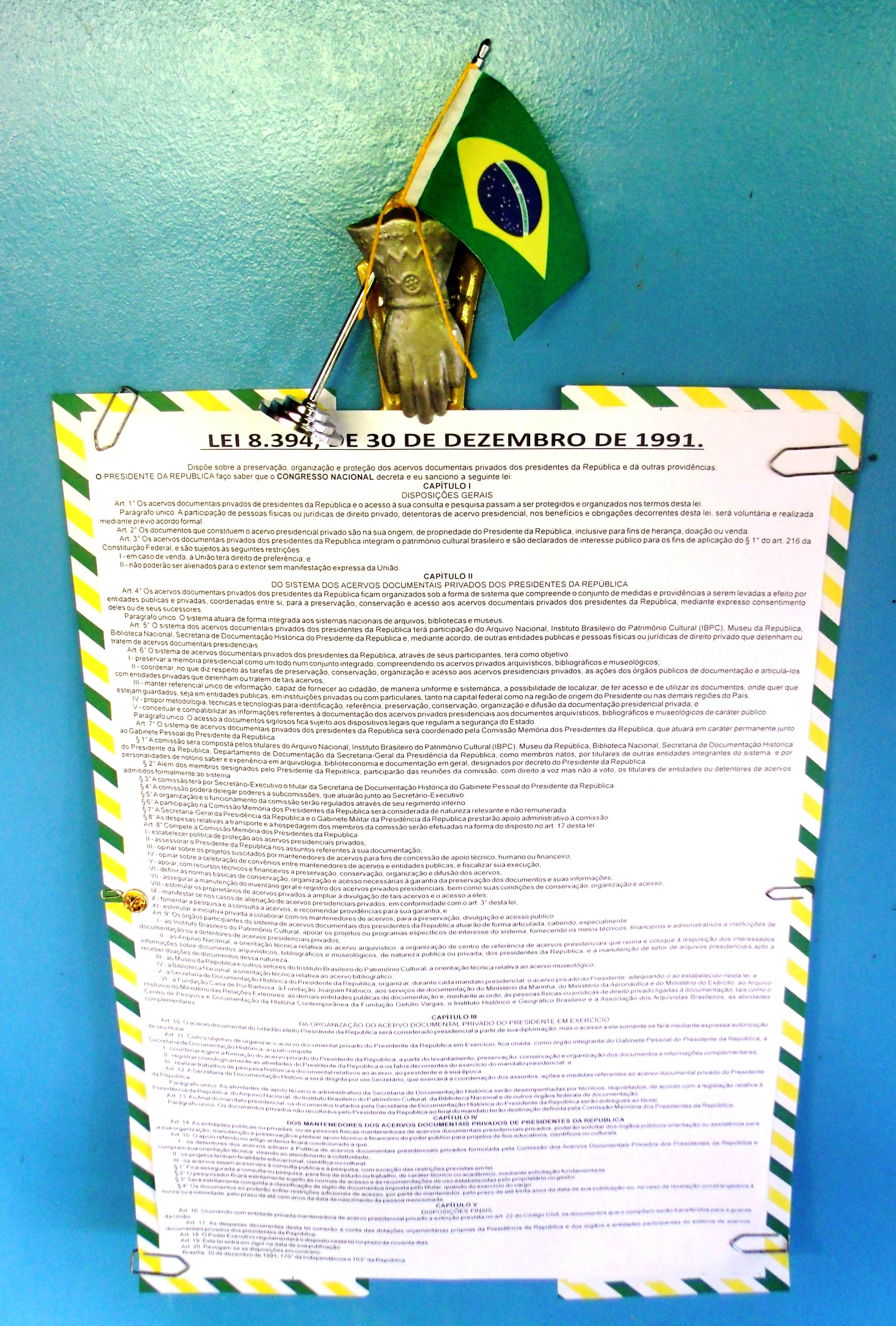 Imagem com o testo da Lei dos Acervos Presidenciais do Brasil.